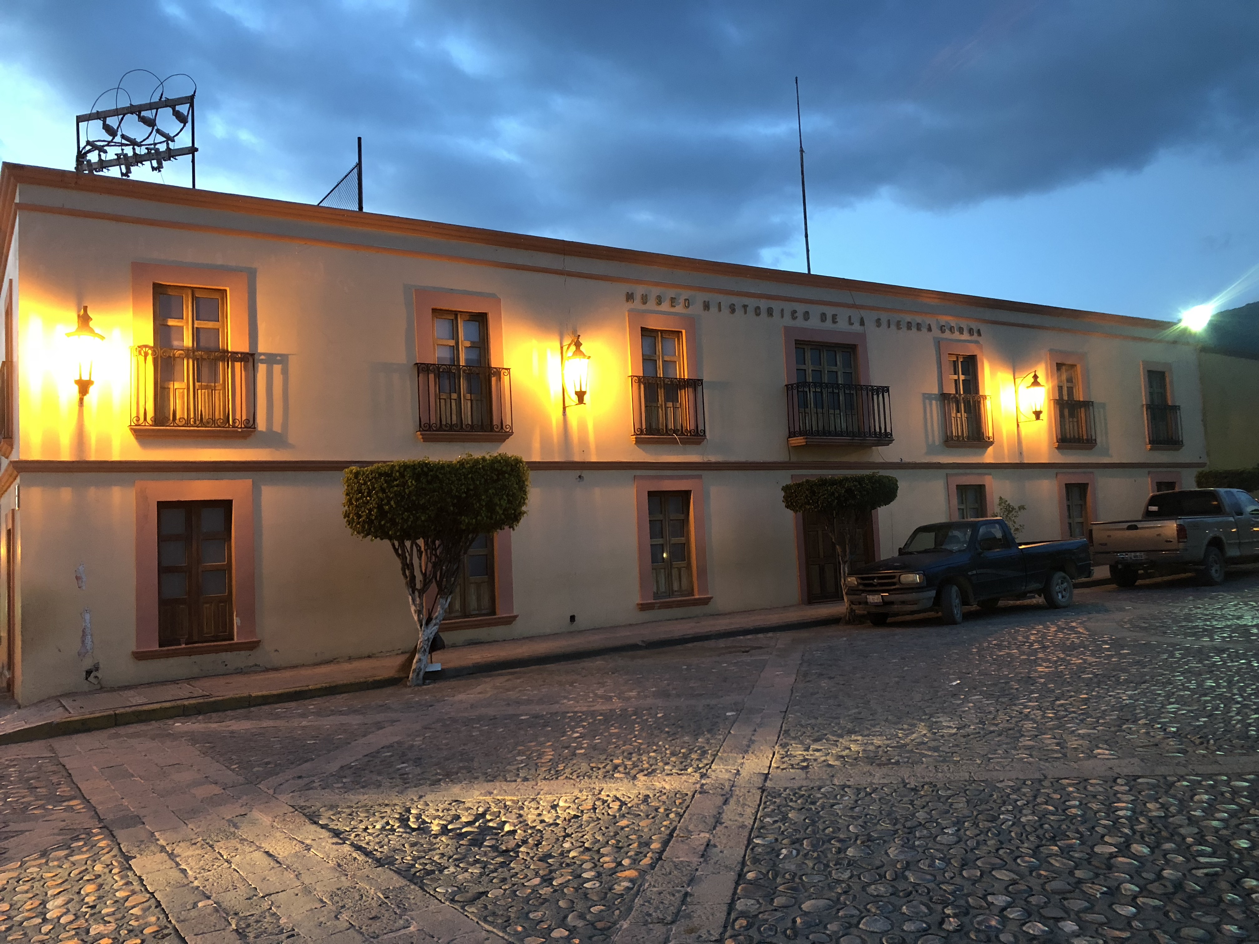 Foto del Museo historico de la sierra gorda, tomada de forma frontal